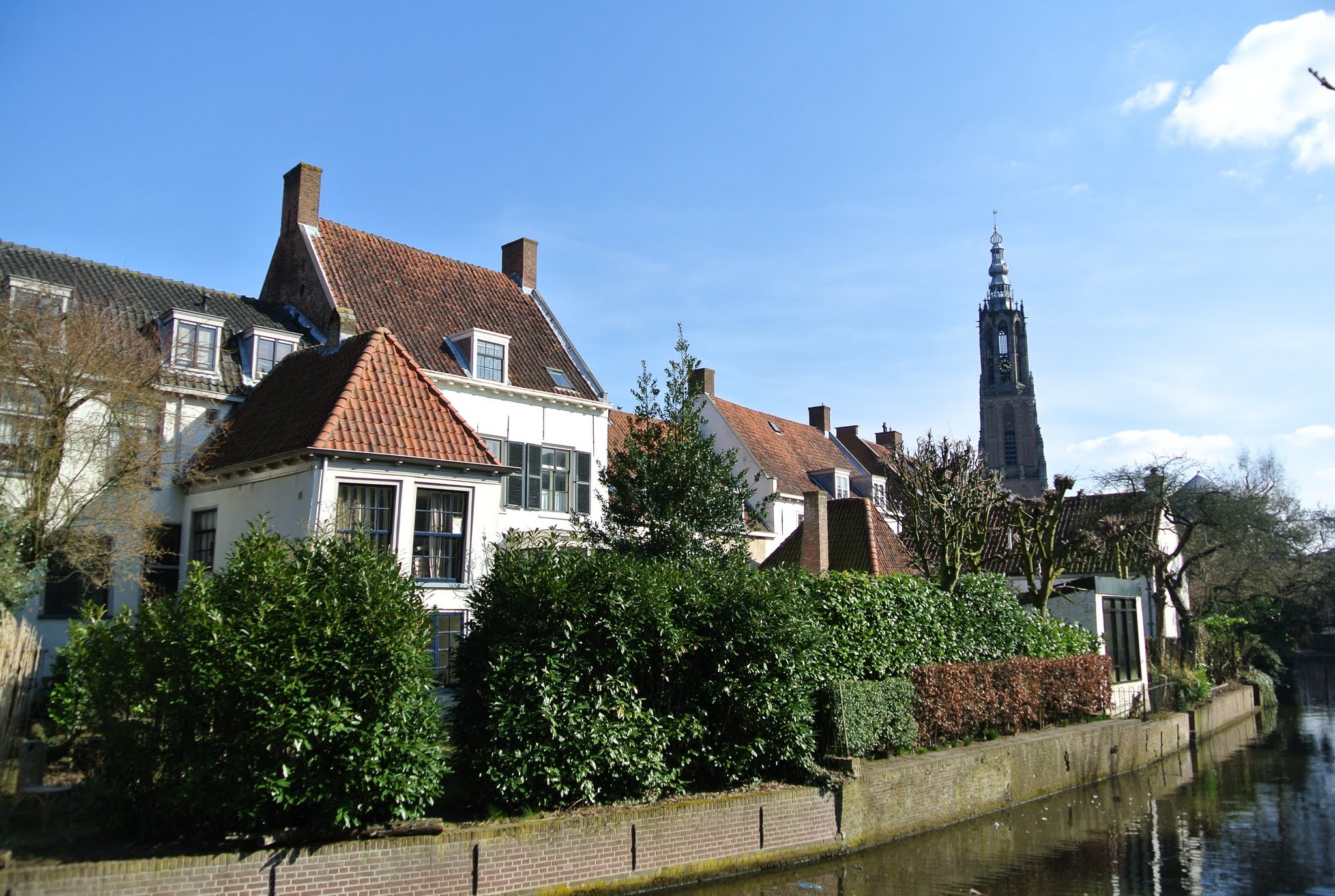 Lieve Vrouwekerkhof, 3811 Amersfoort, Netherlands